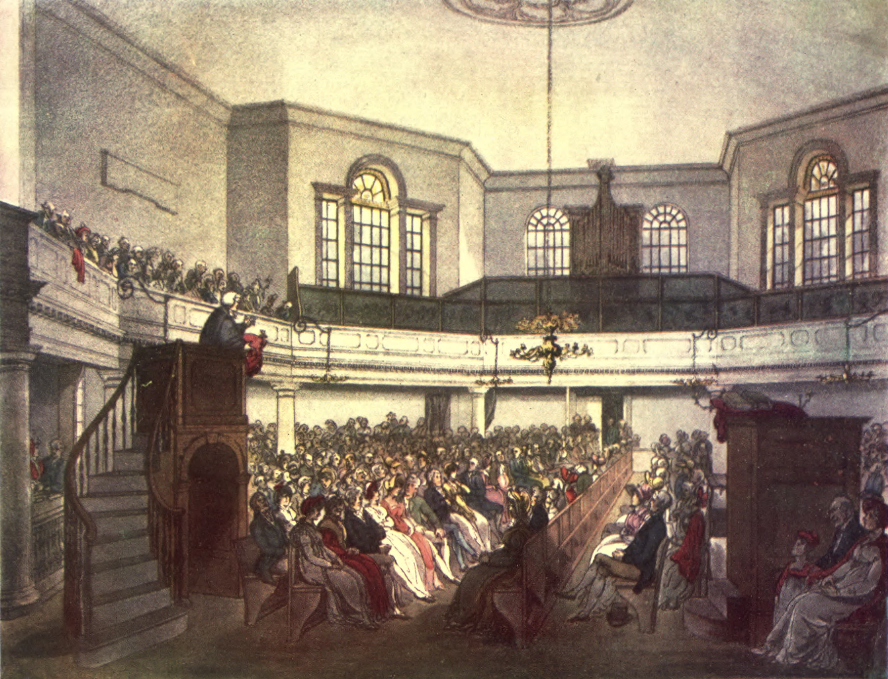 Magdalen Chapel